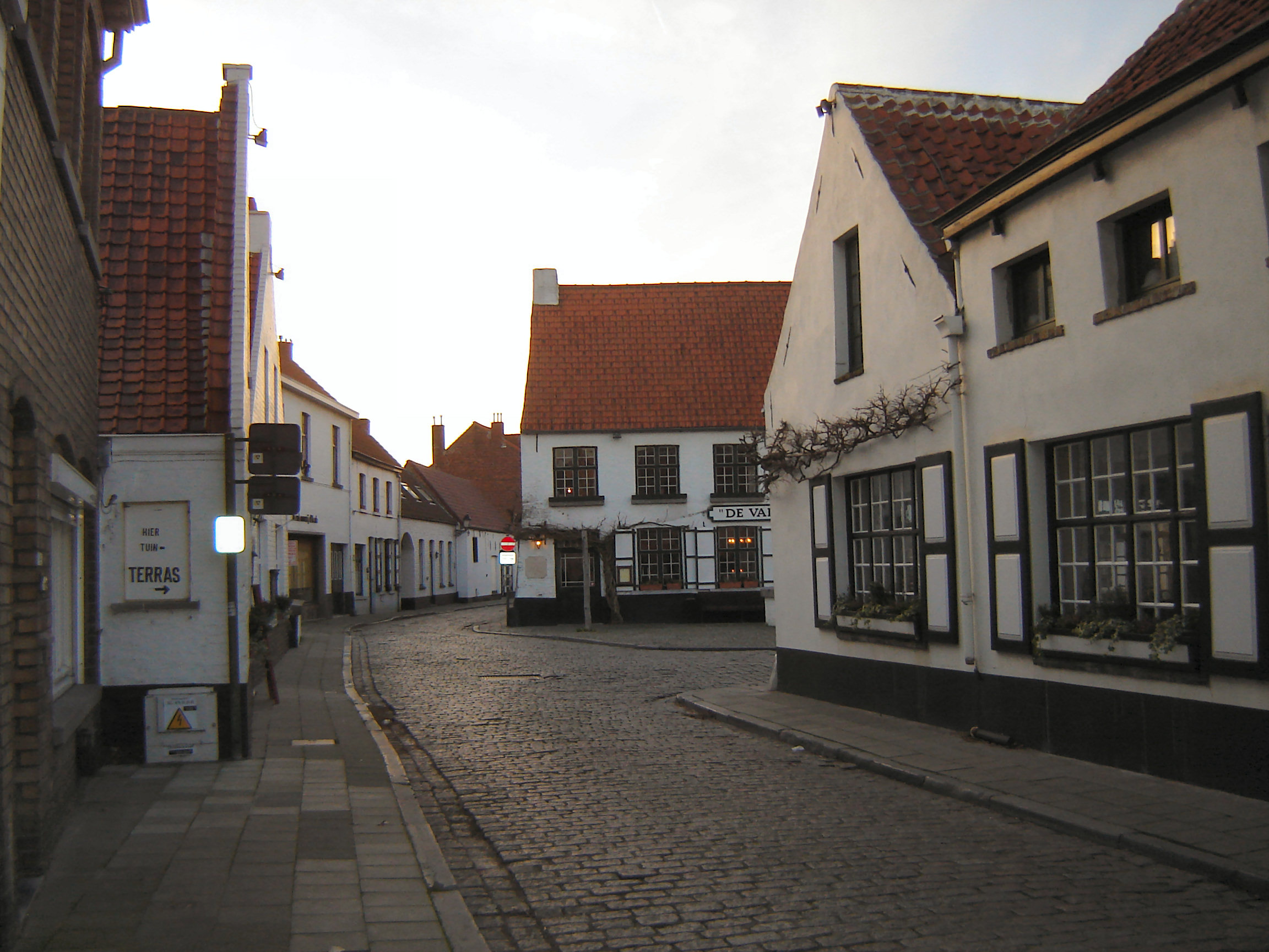 Main street to village centre in Lissewege, West-Flanders, Belgium.